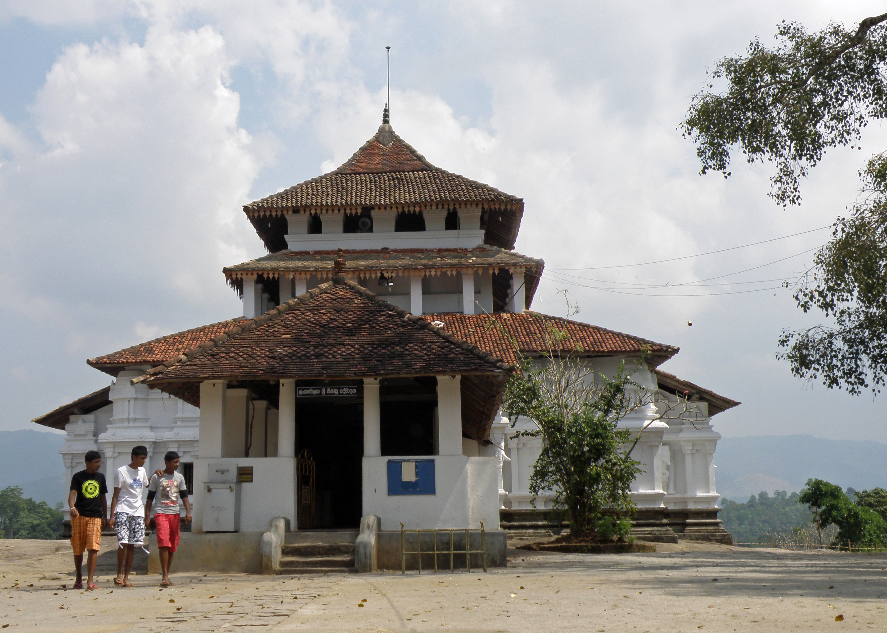 Le Lankatilaka Vihara est un petit complexe bouddhiste étonnamment construit sur une plateforme rocheuse élevée, au Sri Lanka